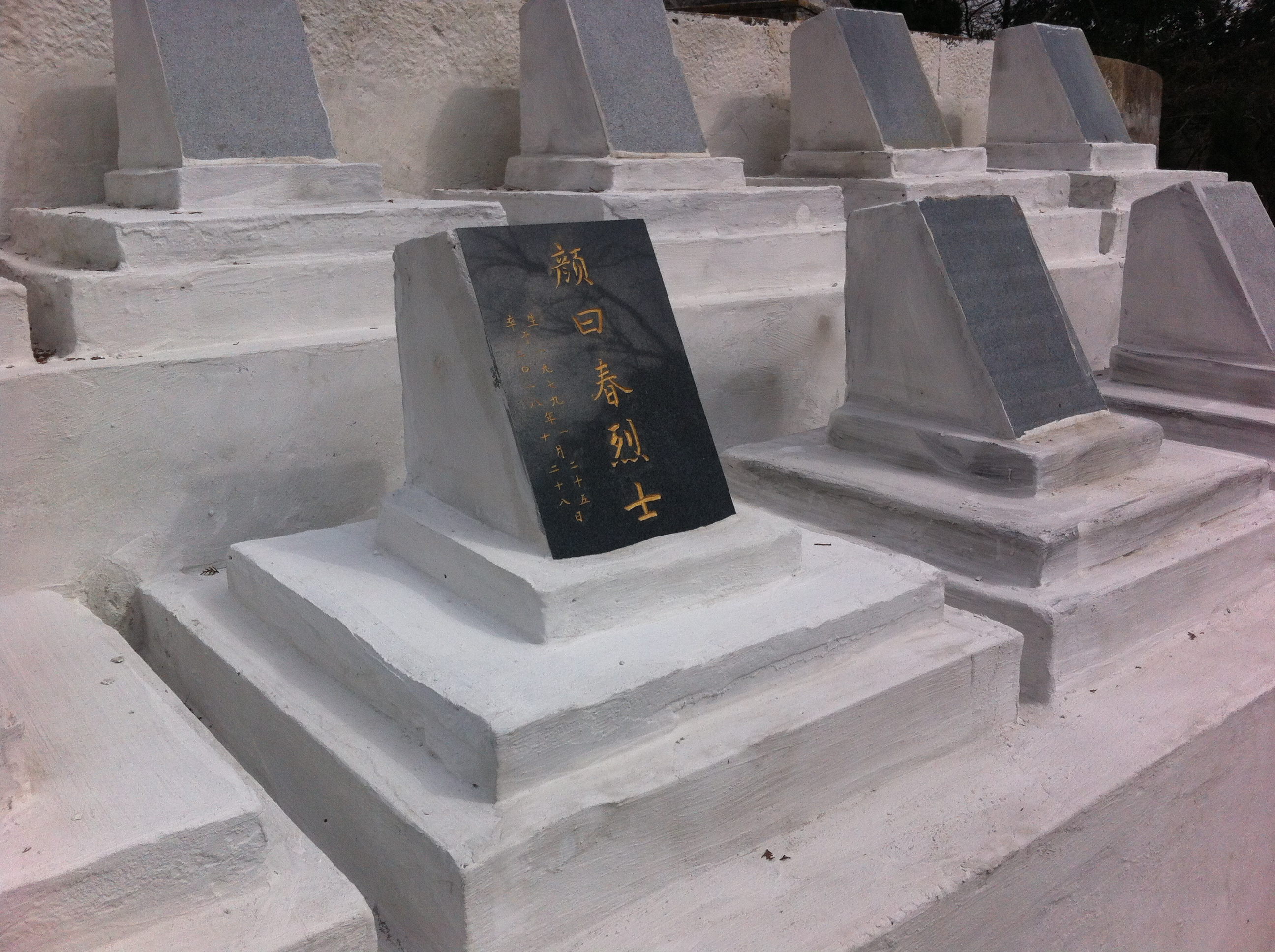 中文（中国大陆）: 玉环市烈士陵园内的颜曰春骨灰盒墓碑